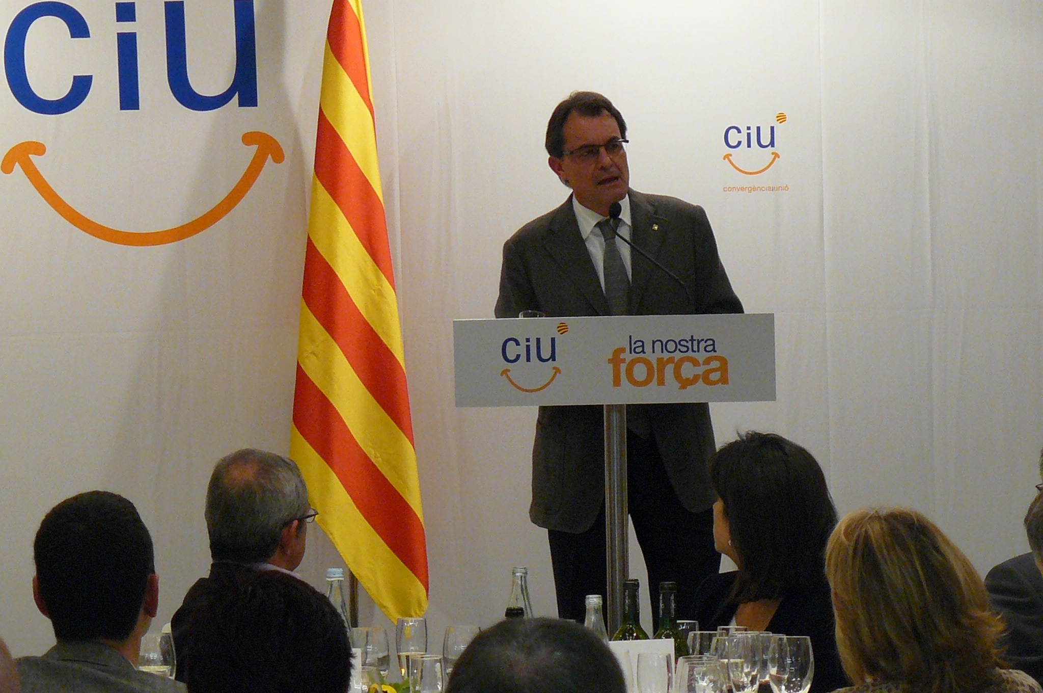 Generals2011 Mas a Figueres.